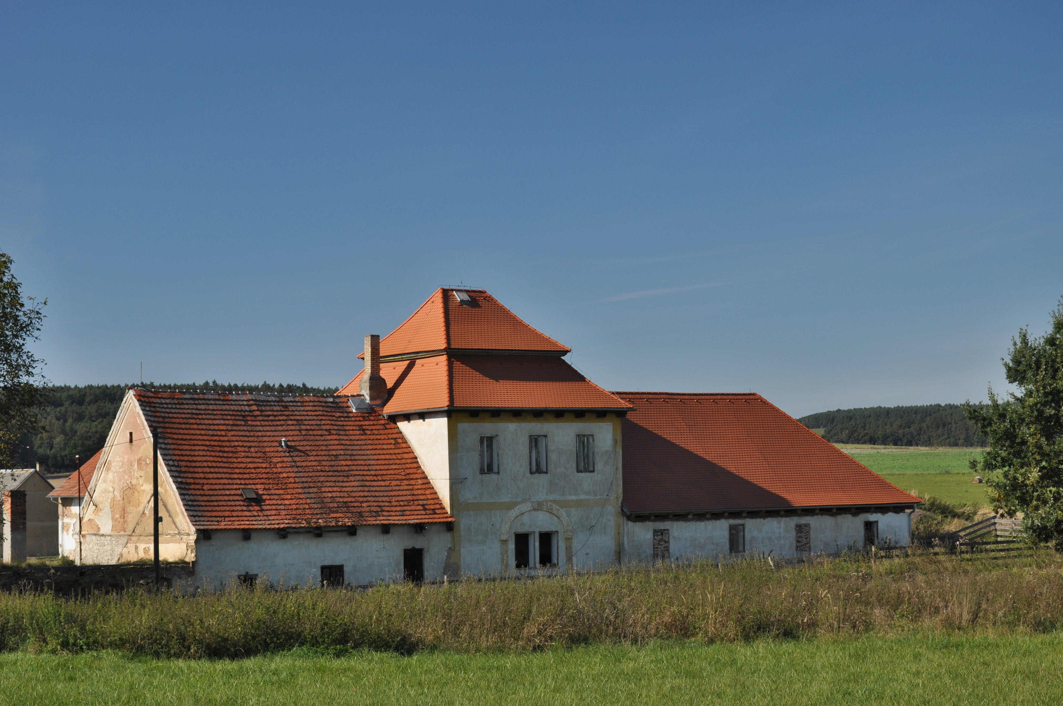 Zemědělský dvůr Rohy, Bohy